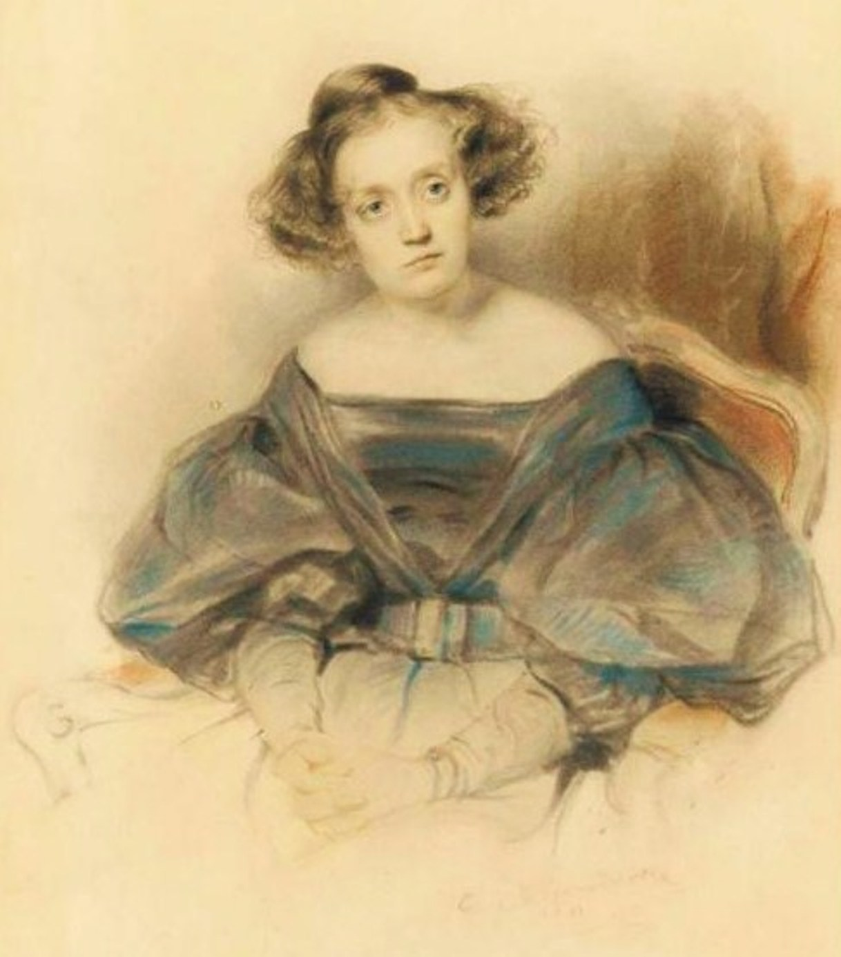 Marie Delaunay dite Marie Dorval, est l'une des plus célèbres actrices françaises du XIXème siècle.